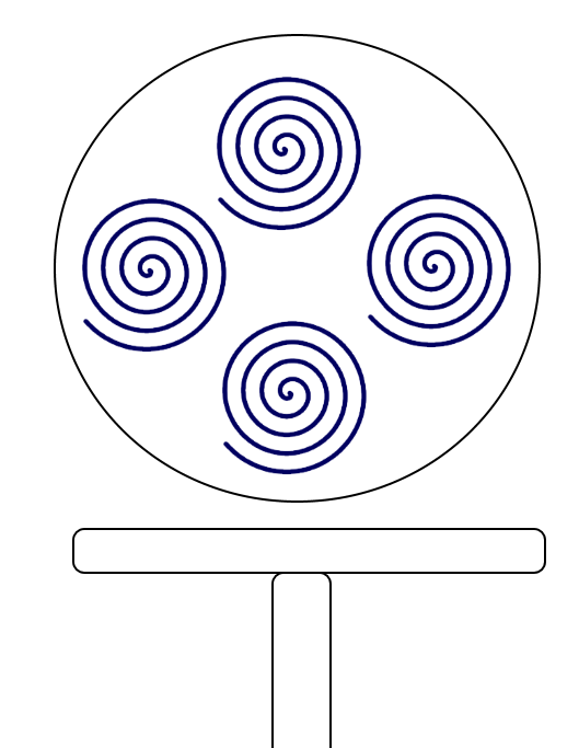 Устройство помехозащищенной GPS-антенны на CRPA